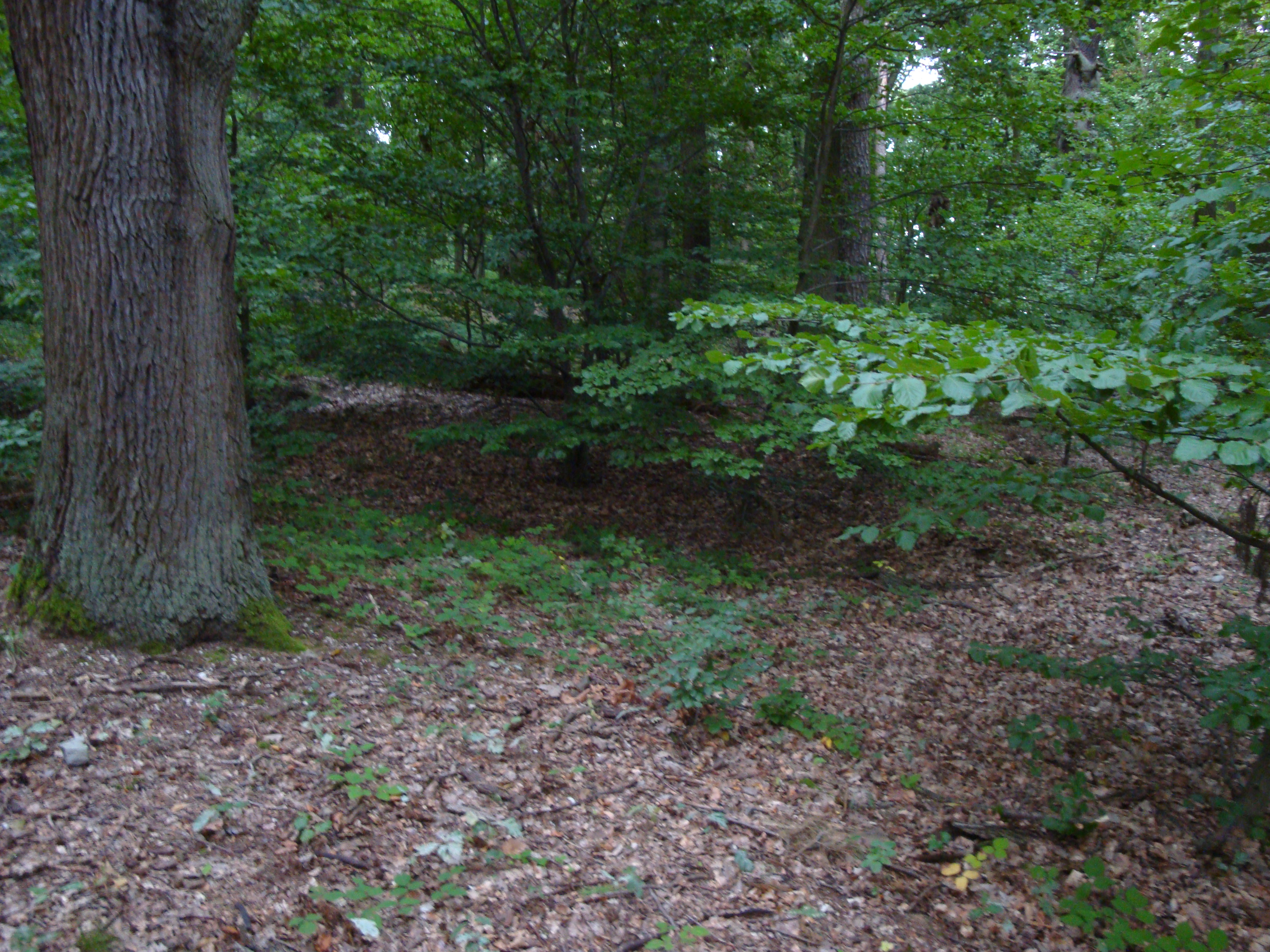 Überreste des Walls am Turmplatz des römischen Wachturms am Ringwall Kapellenberg